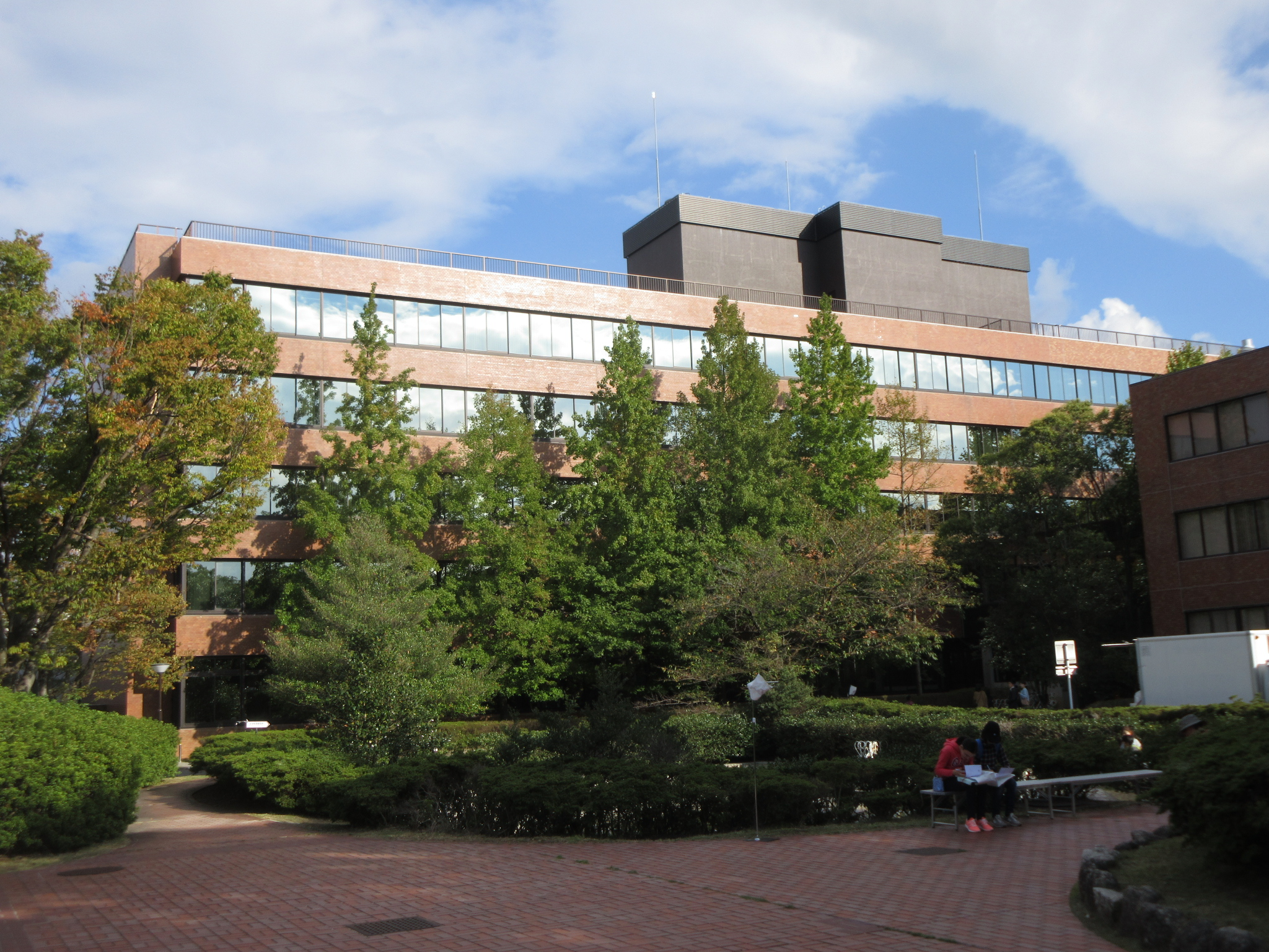 自然科学研究機構、山手キャンパス（愛知県岡崎市）